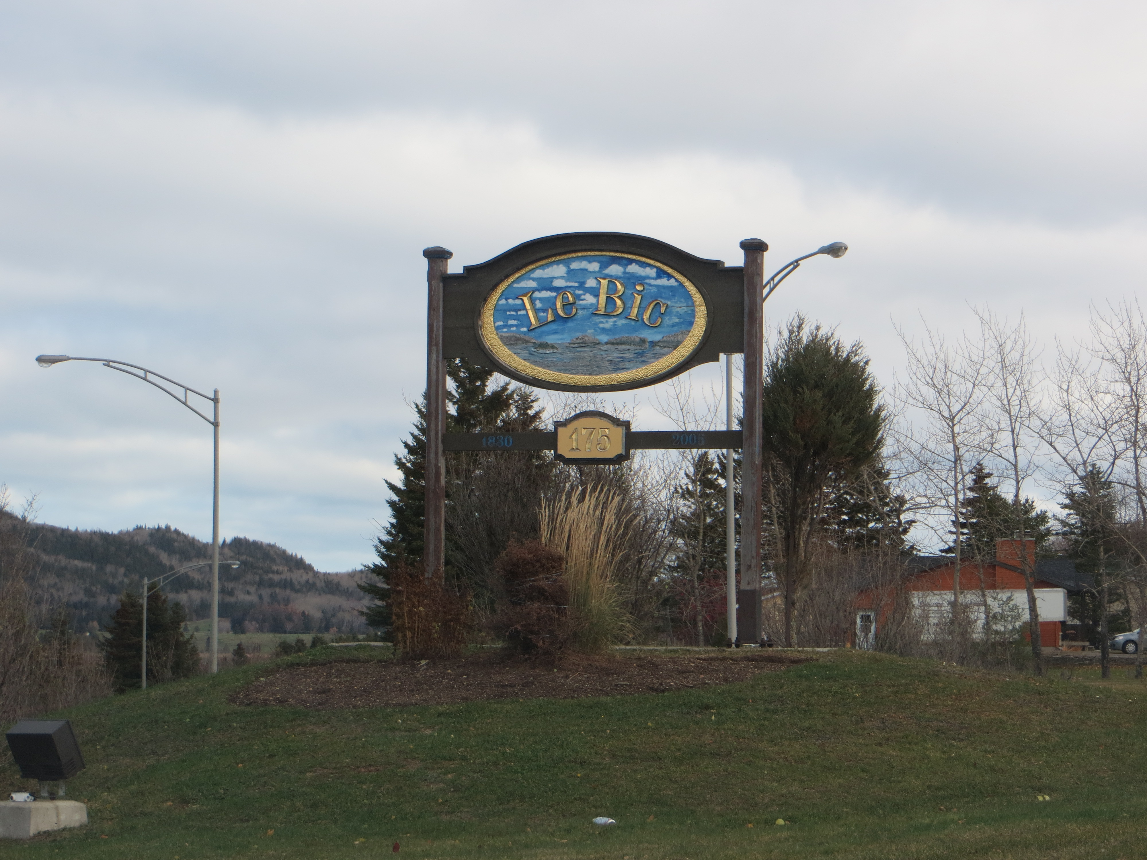 Aviso de bienvenida de Le Bic.